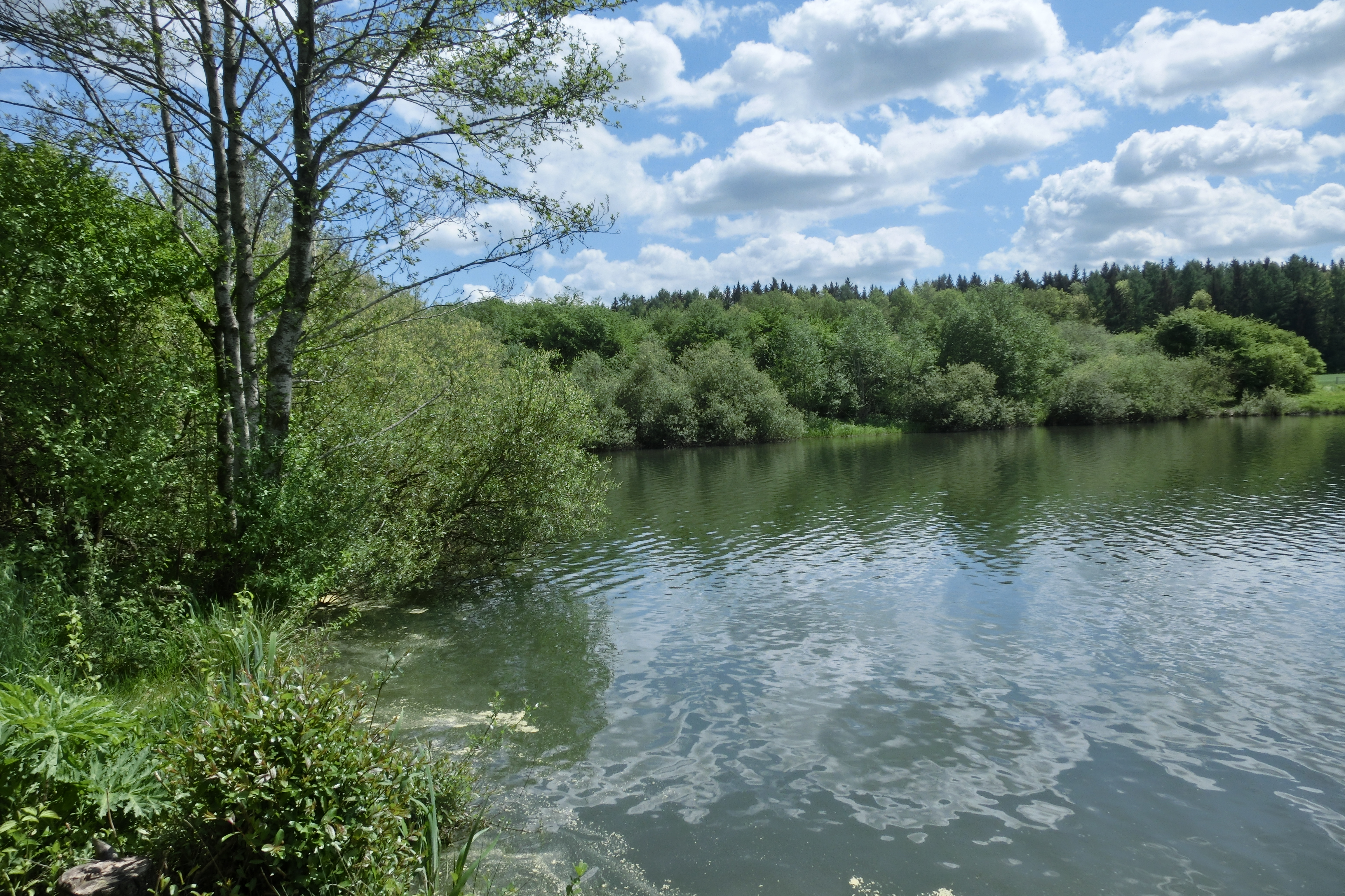 Deutschland - Baden-Württemberg - Landkreis Sigmaringen - Sauldorf: im Naturschutzgebiet "Sauldorfer Baggerseen"